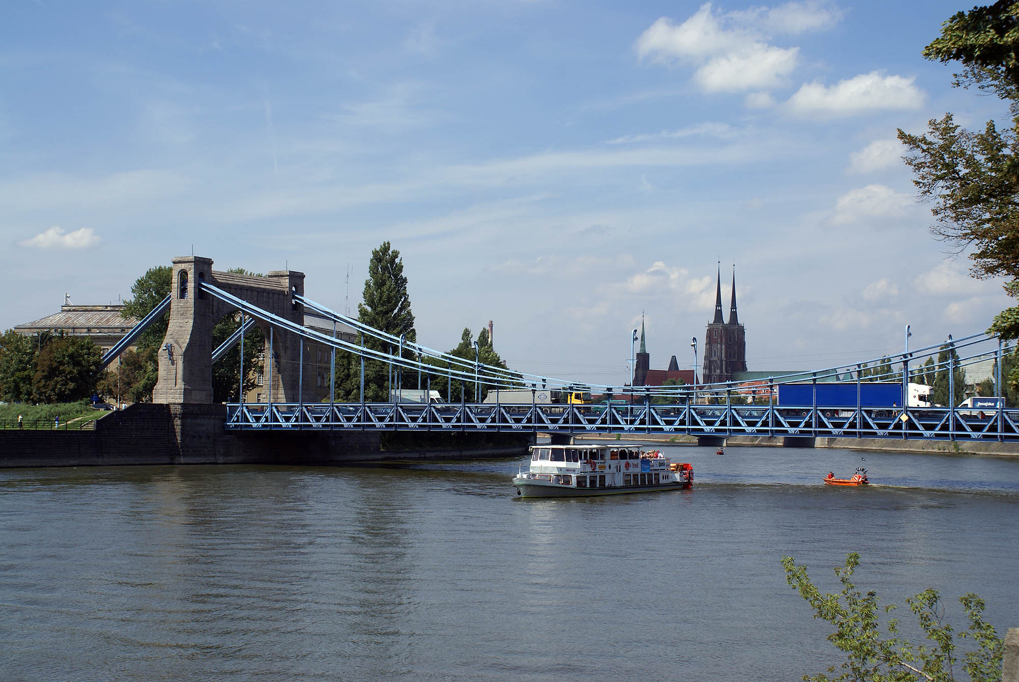 Wrocław, Most Grunwaldzki, 1907